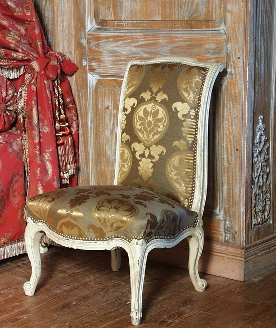 Chauffeuse de style Louis XV "Crosse" réalisée par les Ateliers Allot Frères.